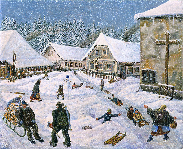 Snow in Karlstift